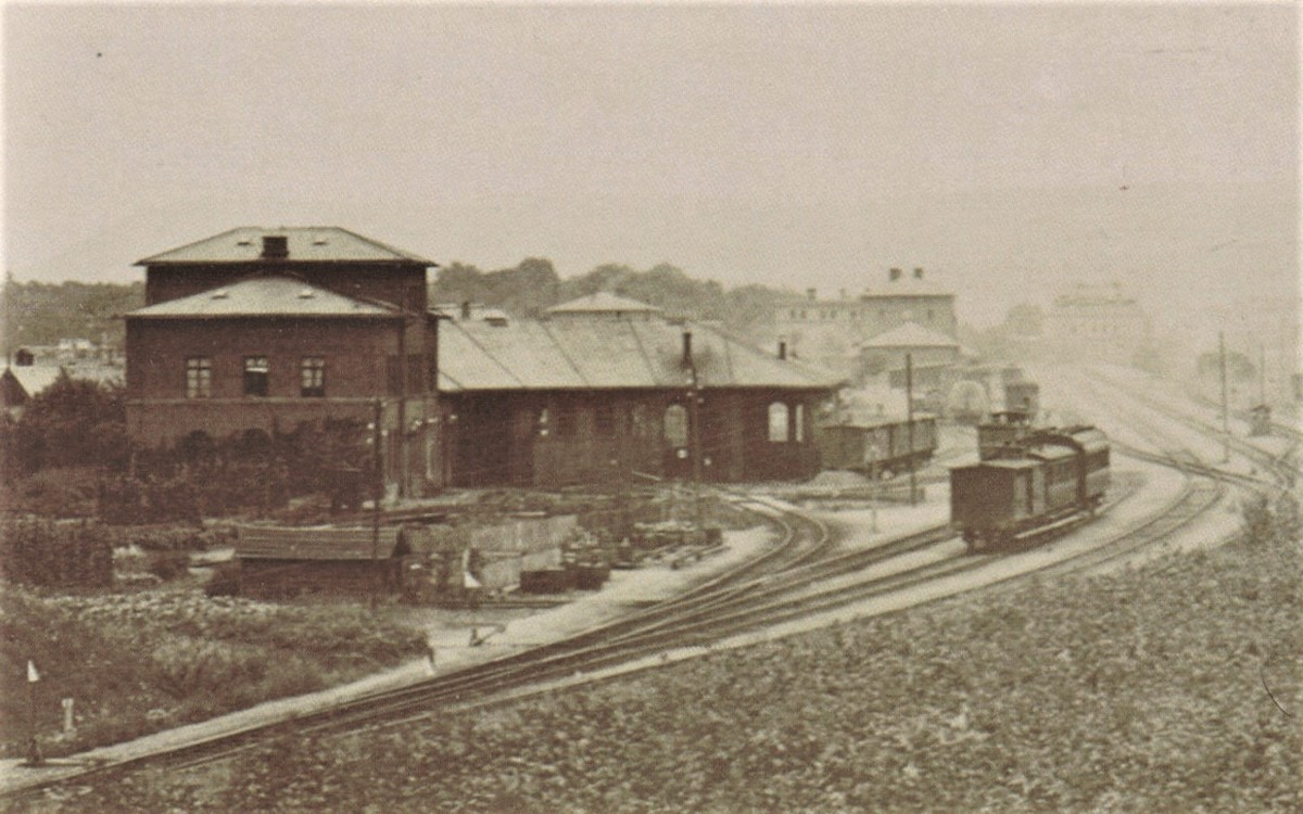 Der Bayerische Bahnhof in Meiningen um 1900, Blick von Süden. Links im Vordergrund die Lokremise, dahinter in der Mitte Lager- und Beamtenwohnhäuser, rechts hinten schwach erkennbar das Empfangsgebäude.